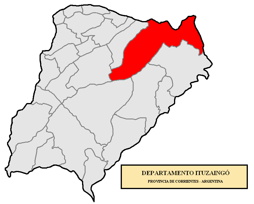 Localización del Departamento Ituzaingó en la provincia de Corrientes, Argentina Localización del Departamento Ituzaingó, en la provincia de Corrientes, Argentina.